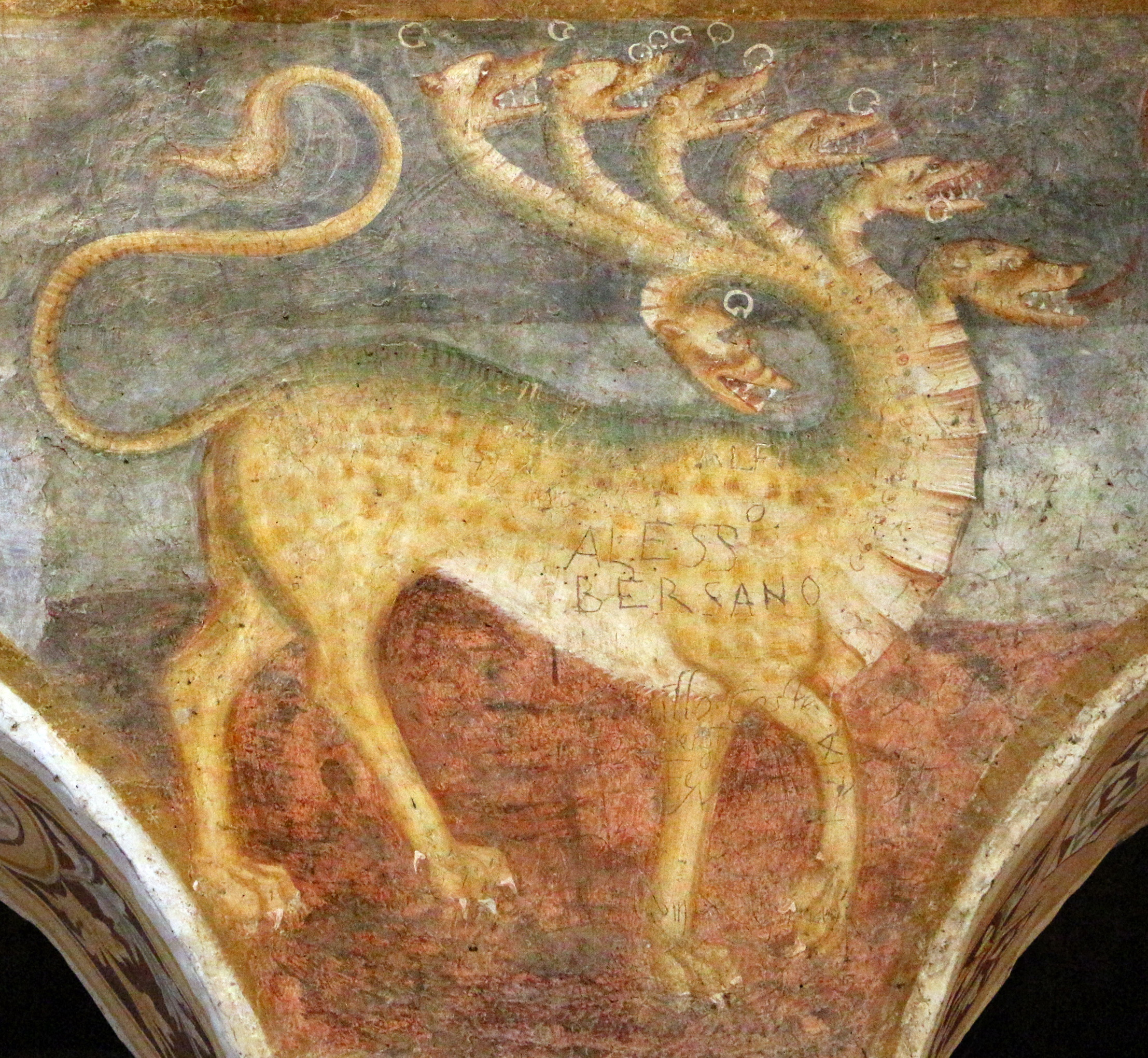 Abbazia di Pomposa This is a photo of a monument which is part of cultural heritage of Italy.